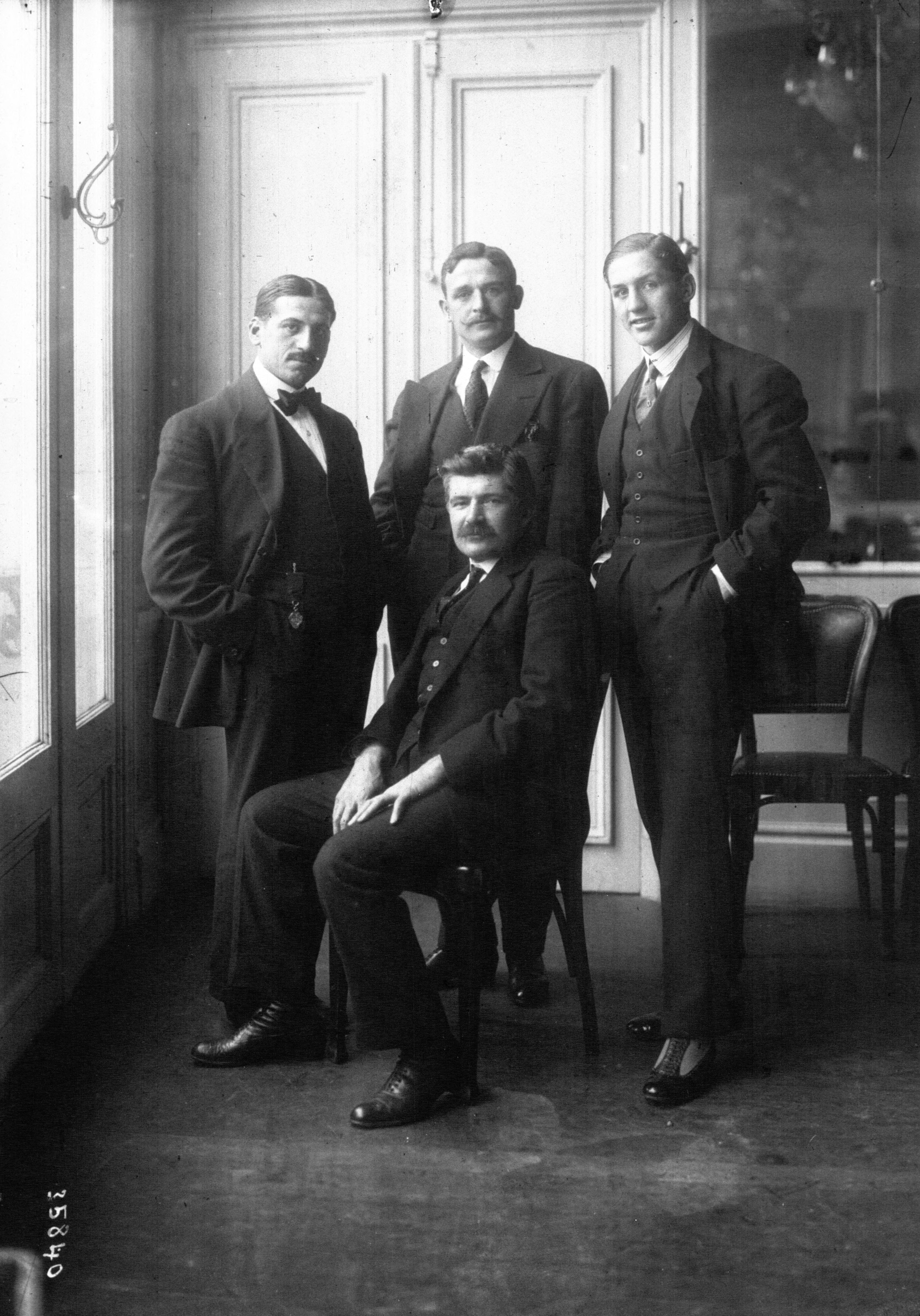 Groupe de trois champions : Bouin, Faber, Carpentier et leur masseur Pastair.